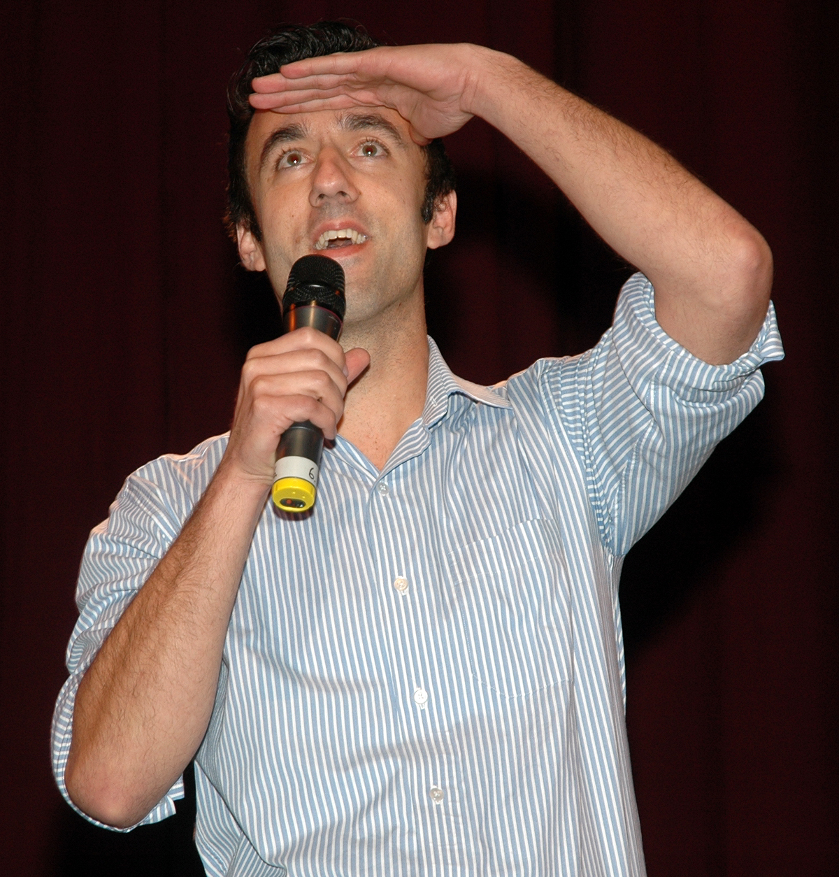 Matthias Jung bei seinem Auftritt auf der Internationalen Kulturbörse in Freiburg 2012